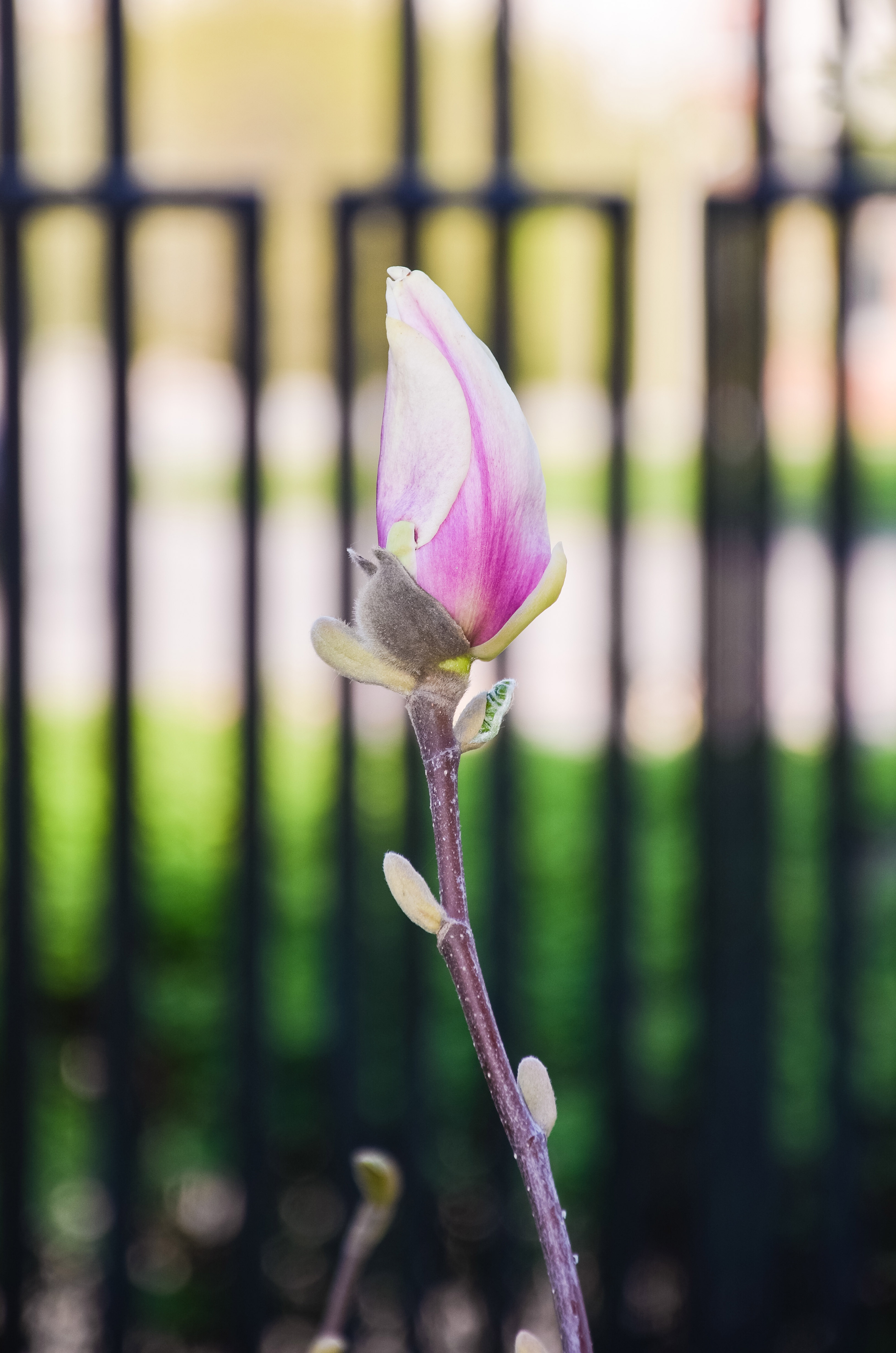 В кінці квітня - на початку травня 2015 року почали квітнути магнолії у ботанічному саду Хмельницького національного університету